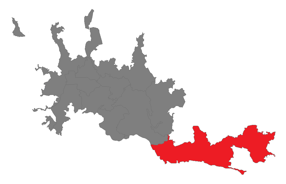 mapa de ubicacion de la comuna tesorito en manizales